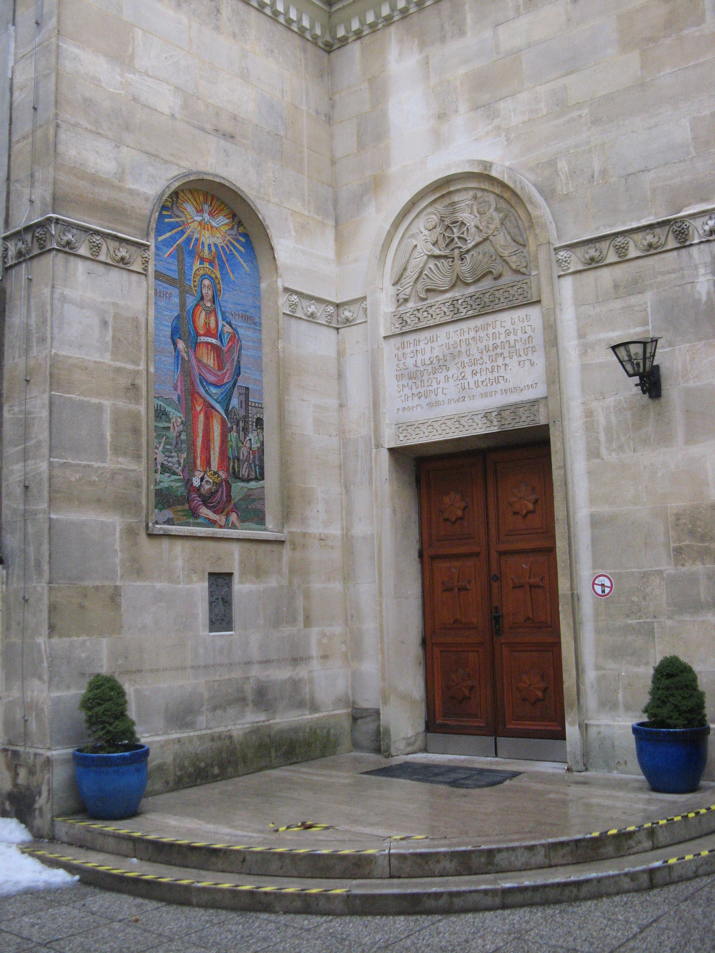 Armenische Kirche St. Hripsime, Portal, Kolonitzgasse 11, Wien-Landstraße